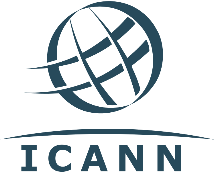 Logo do ICANN (acrônimo em inglês para Corporação da Internet para Atribuição de Nomes e Números)